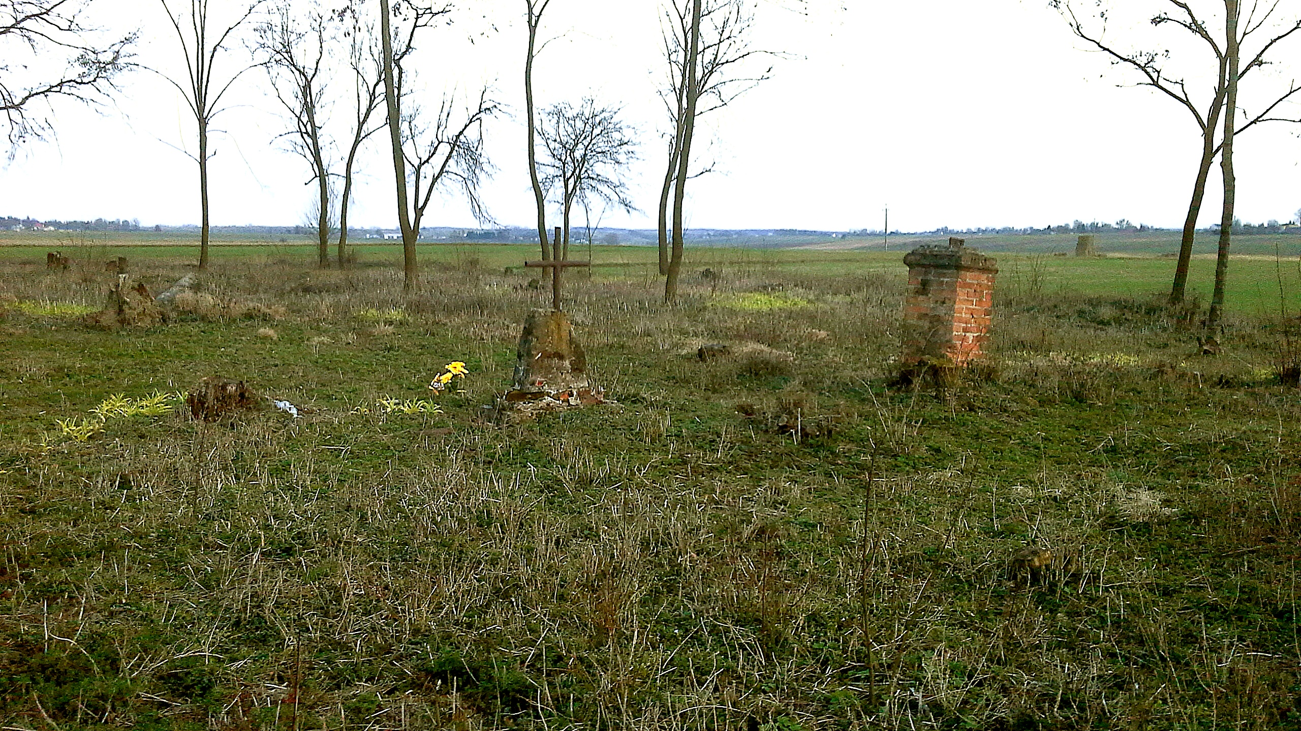 Cmentarz prawosławny w Teratynie